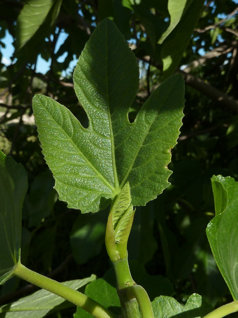 Ficus carica (Higuera) : Hoja joven desplegada y yema emergiendo de las estípulas - Avda de la Libertad, Albatera (Alicante, España).